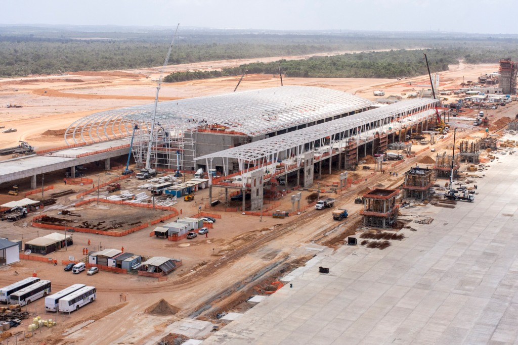 Canteiro de obras do Aeroporto Internacional de São Gonçalo do Amarante, em construção no Rio Grande do Norte. Foto de setembro de 2013.